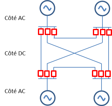 Réseau HVDC maillé n'incluant pas de disjoncteur HVDC. Les disjoncteurs HVDC sont en noir, les Postes de conversion HVDC en rouge.